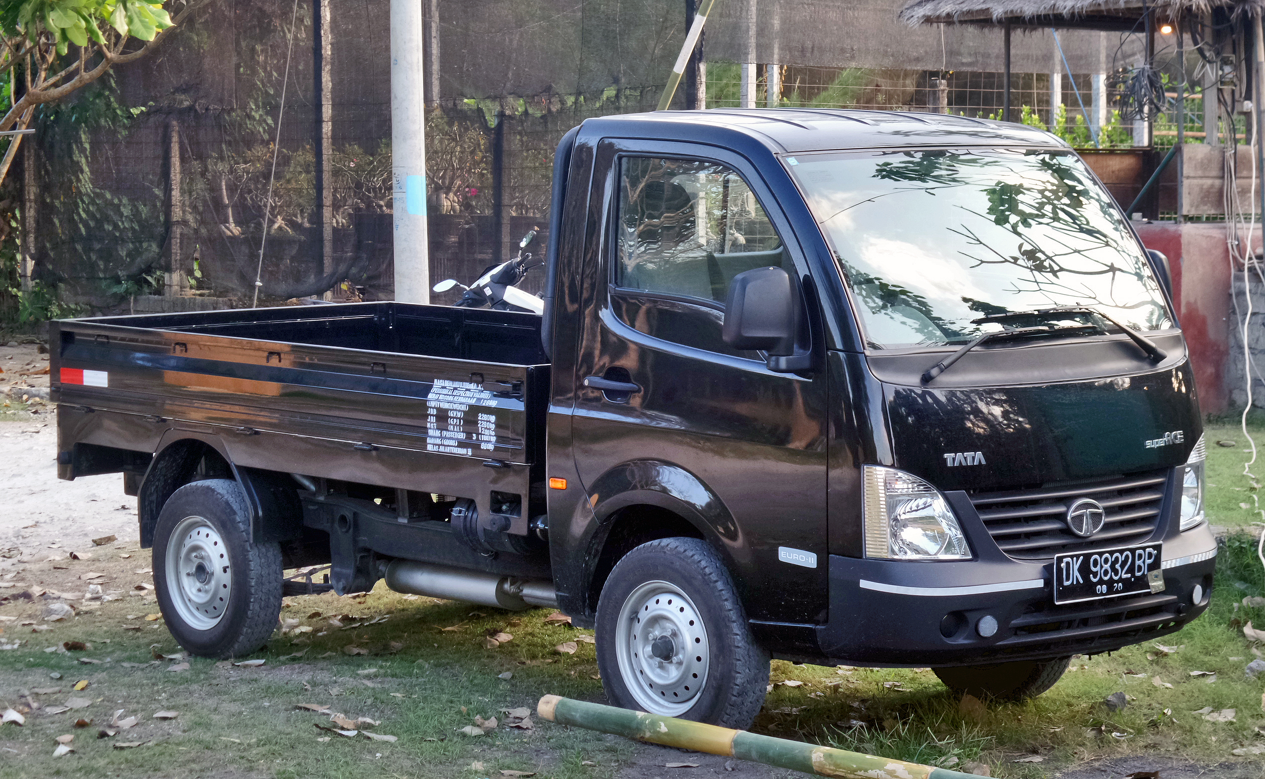 Sisi depan pikap Tata Super Ace DLS di parkiran Taman Jepun, Jl. Hayam Wuruk, Kota Denpasar, Bali